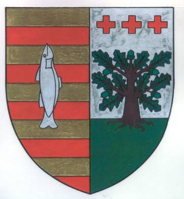 Wapen van Maaseik